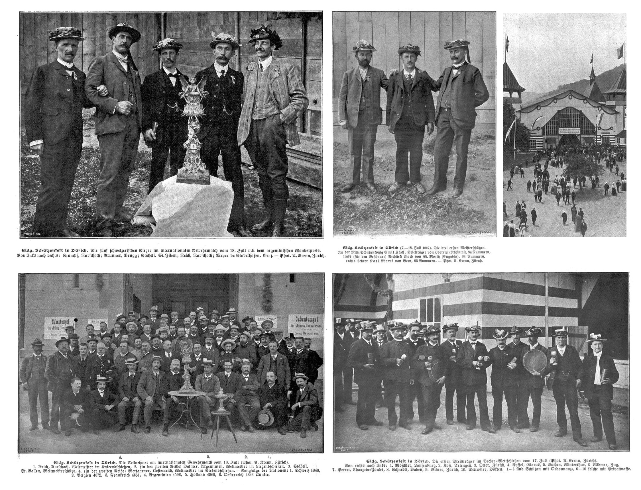 1907, Eidgenössisches Schützenfest in Zürich. Foto A. Krenn, Zürich